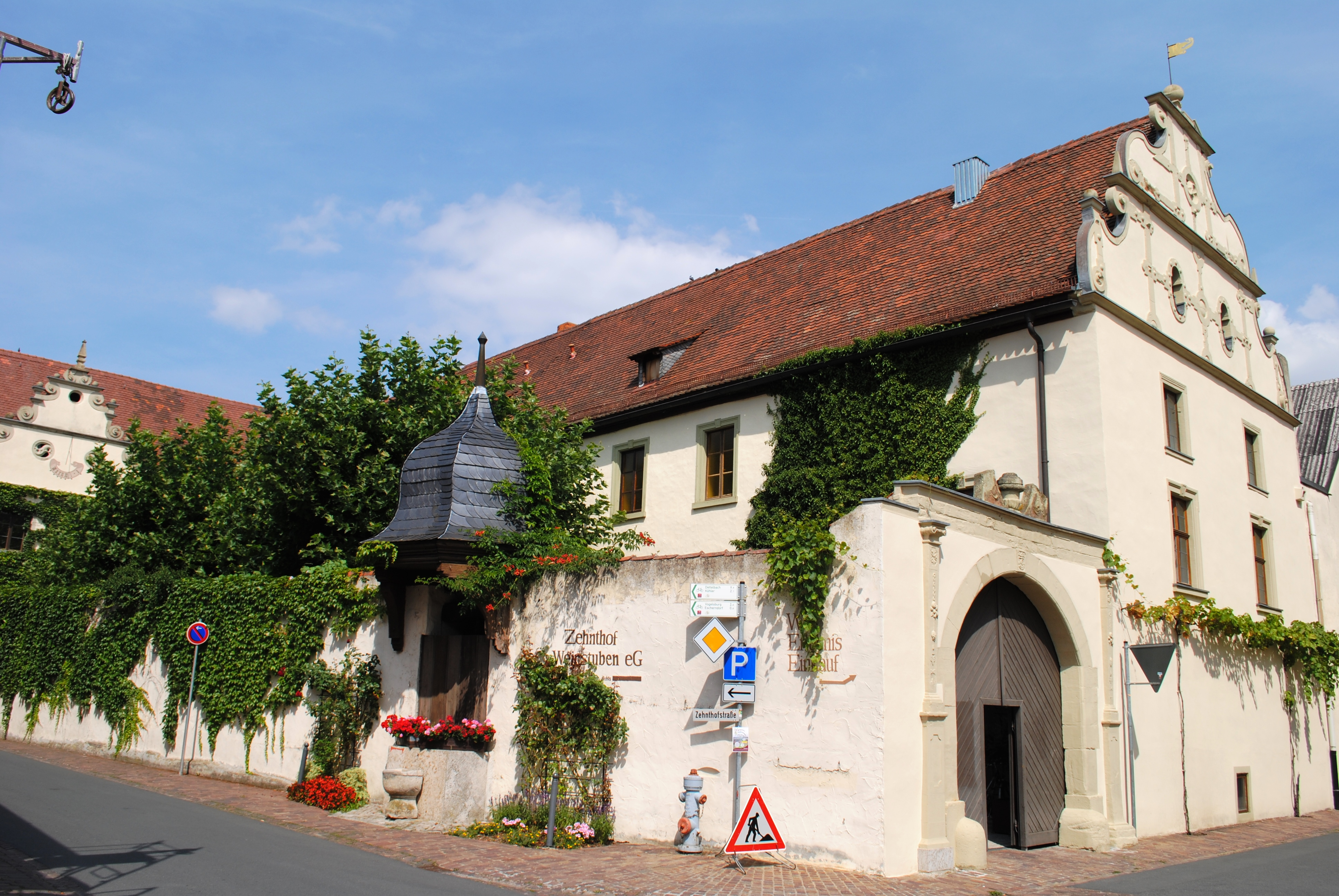 Ensemble, Zehnthof, Hauptstraße, Nordheim am Main